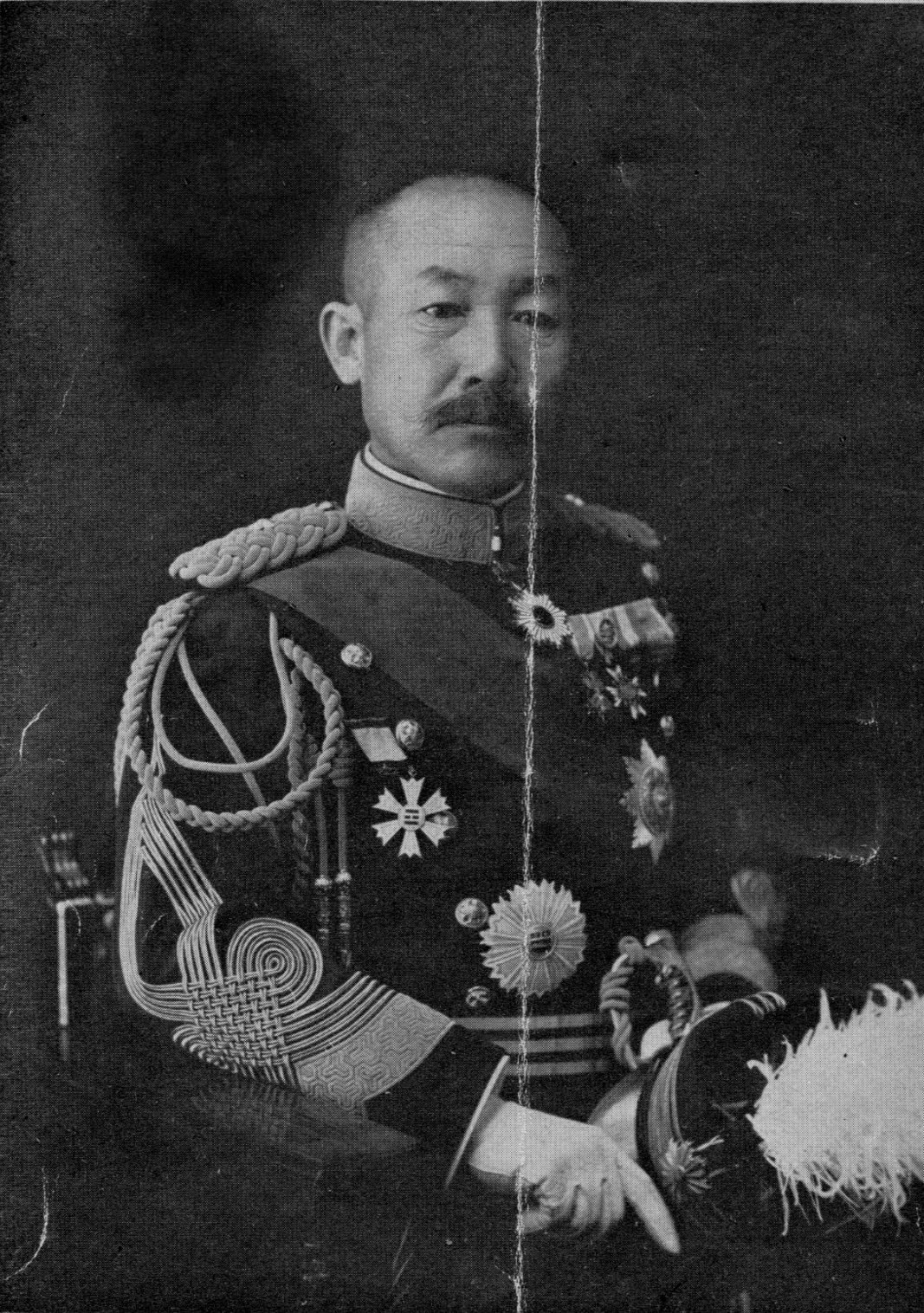 陸地測量部長時代